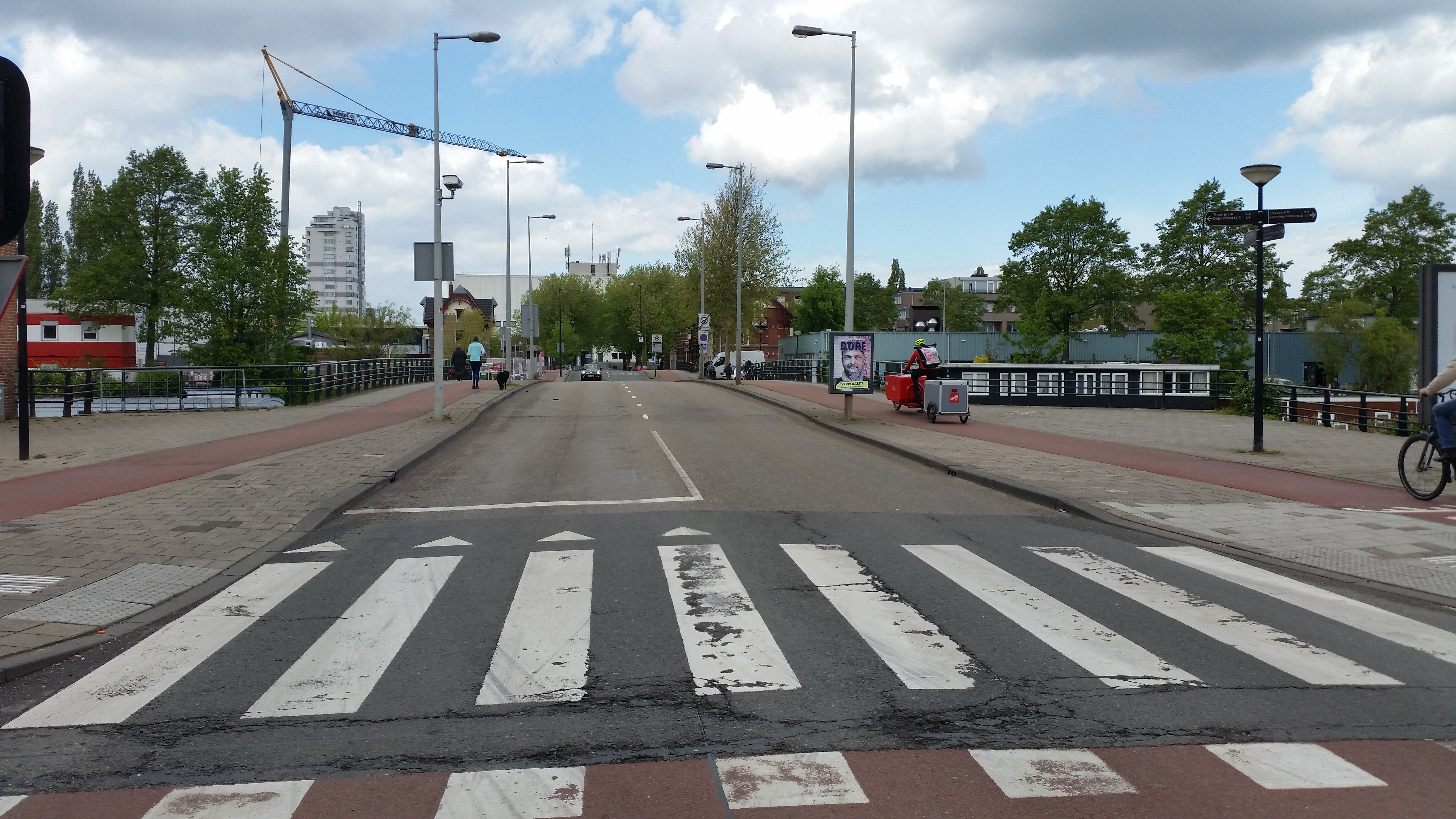 Impressie van de Veebrug (brug 261) in de Veelaan, Amsterdam, over het Lozingskanaal (april 2020)